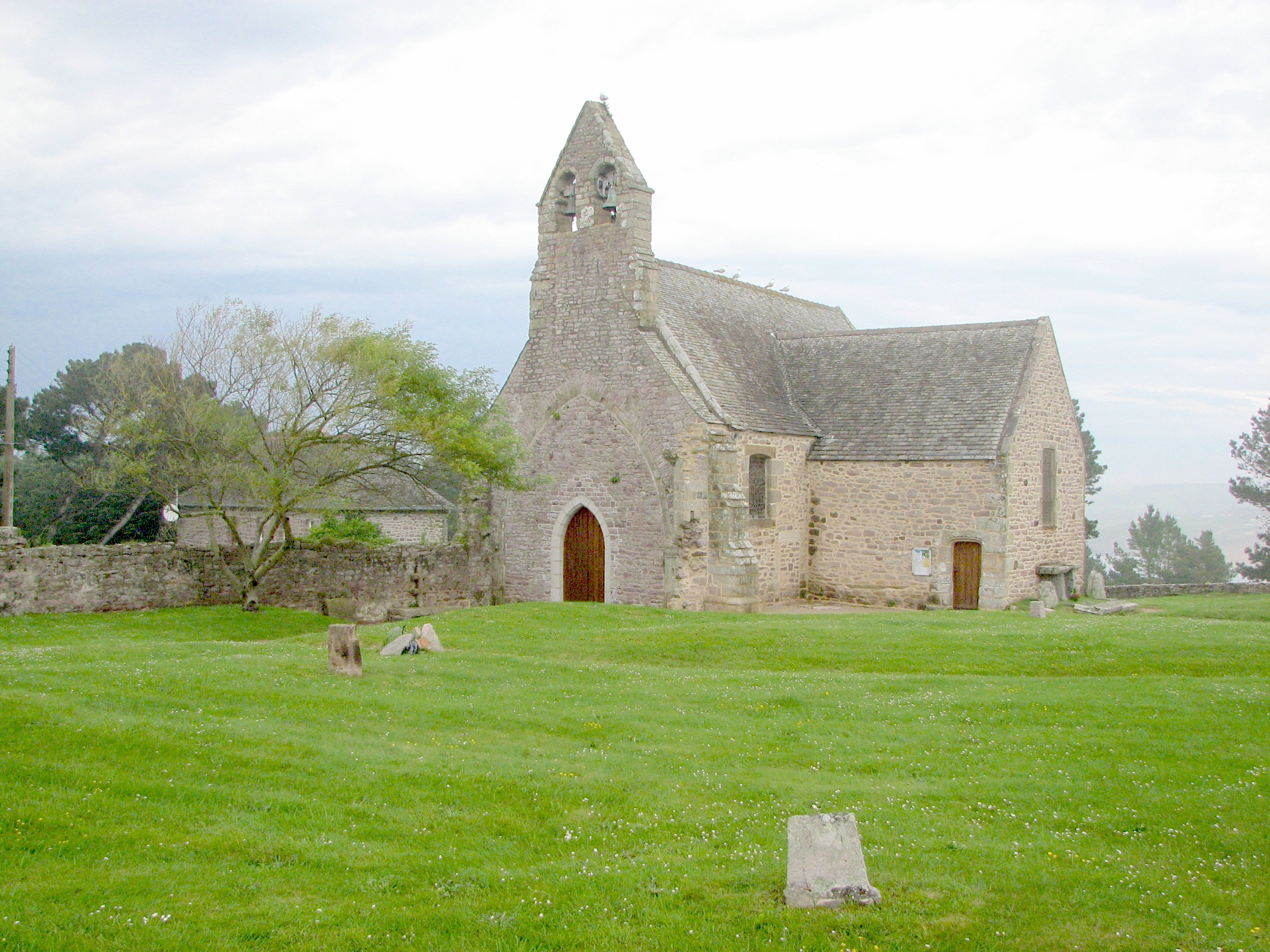 Chapelle du Vieux Bourg de Pléhérel sur l'actuelle commune de Fréhel (Côtes d'Armor)